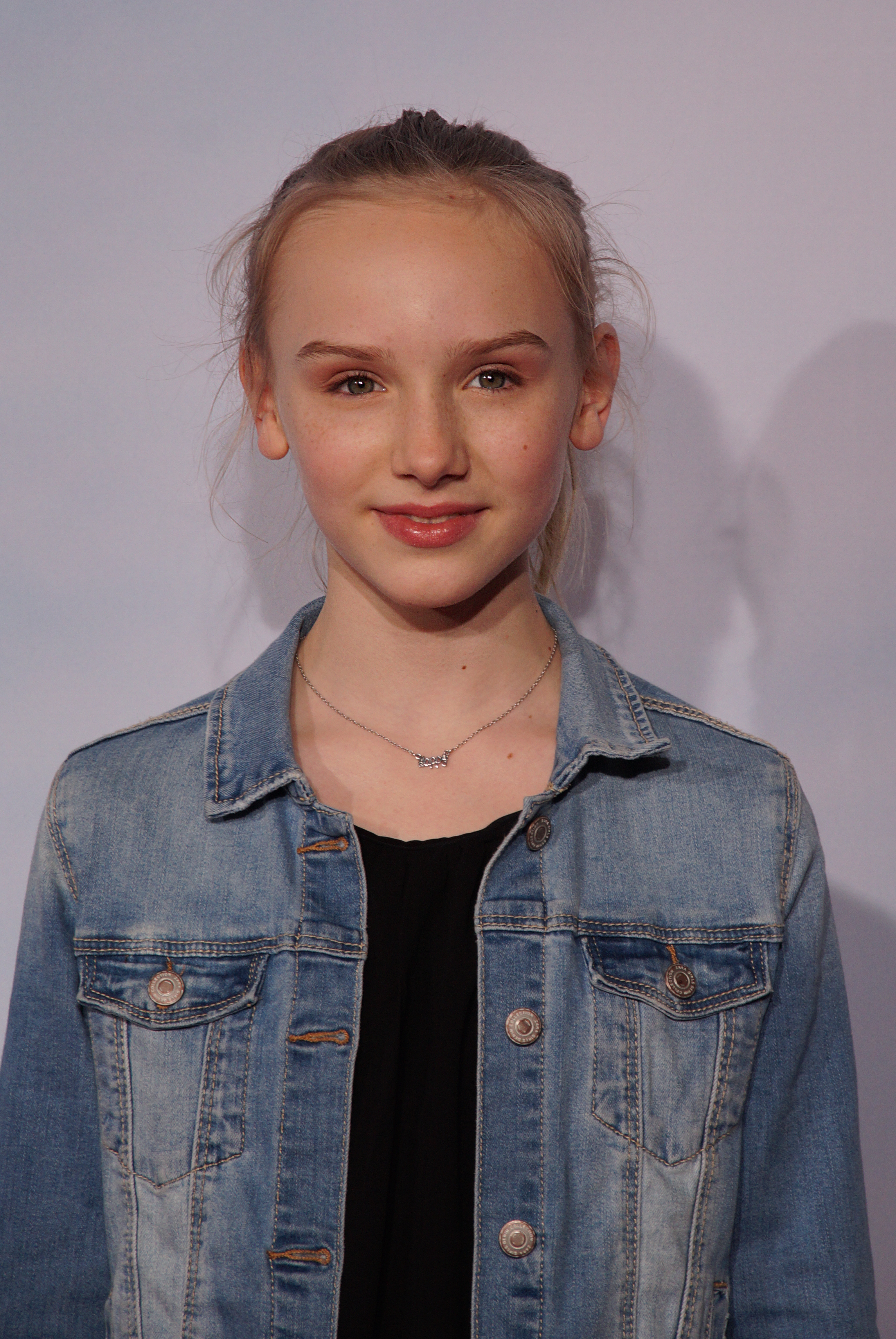 Jule Hermann bei der 'Wendy - Der Film' Premiere, im Januar 2017.